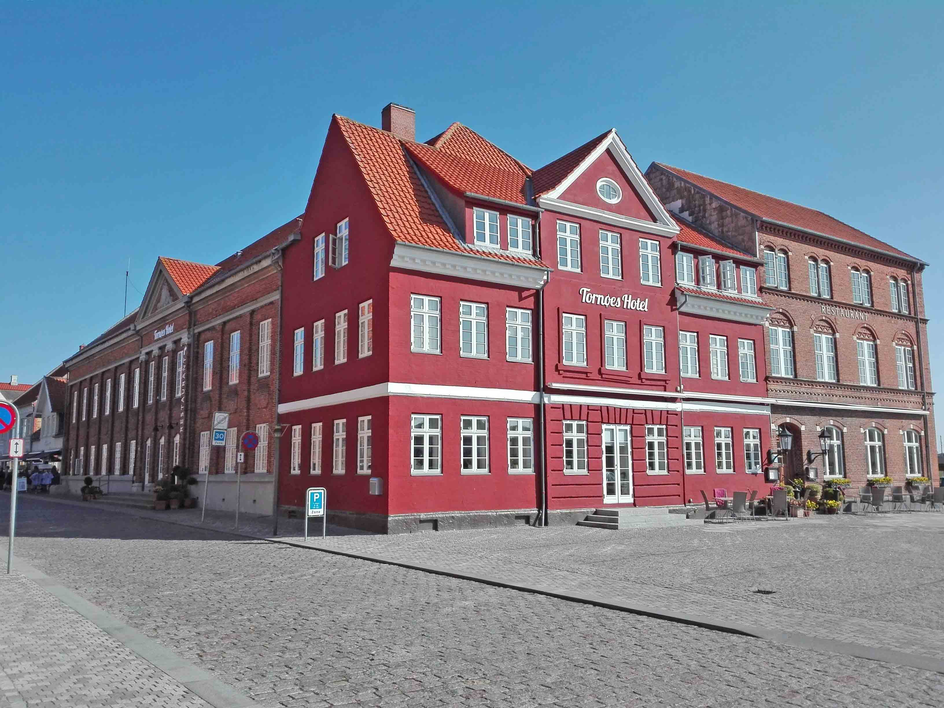 Tornøes Hotel i Kerteminde